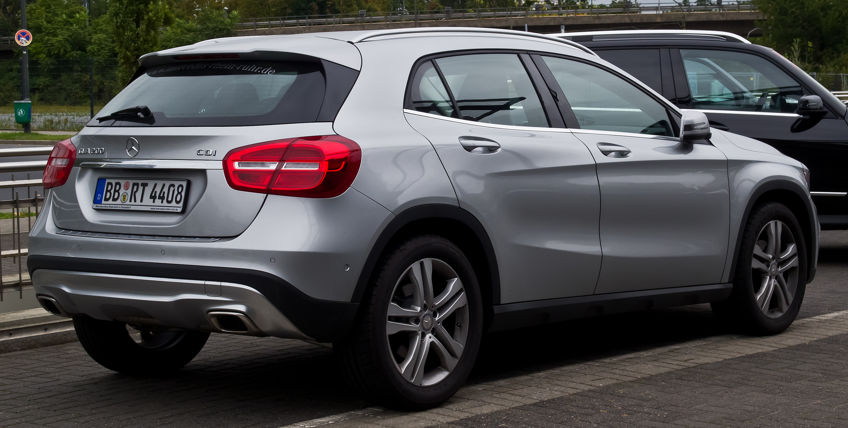 Mercedes-Benz GLA 200 CDI Urban (X 156)